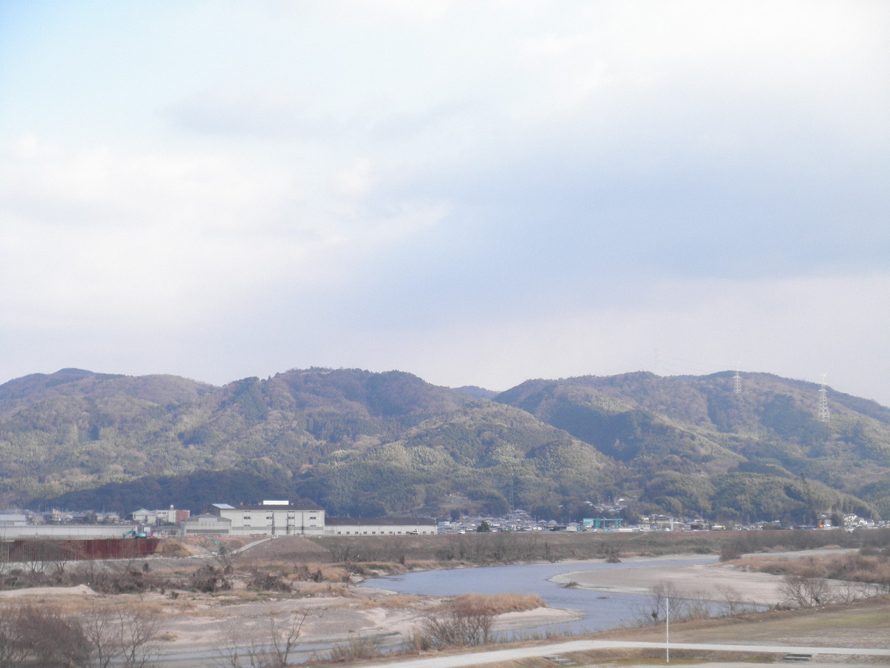 京都府綴喜郡井手町多賀 遠景